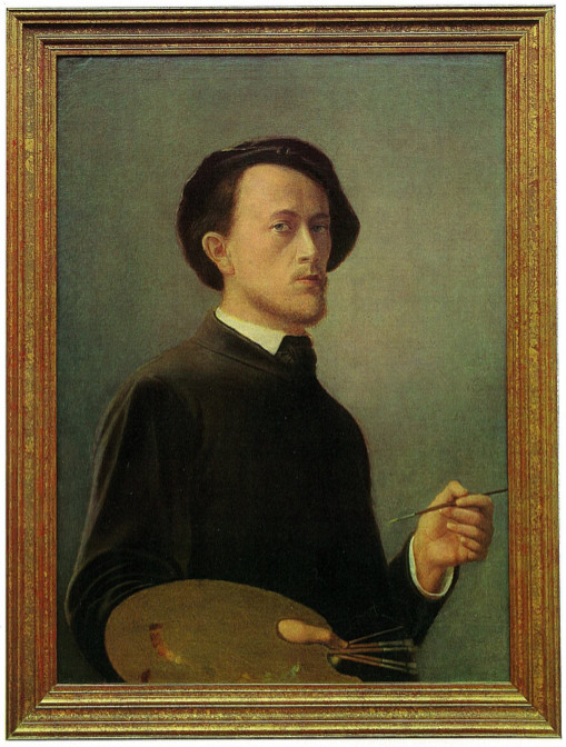 Johann Baptist Scholl (1818-1881), Selbstbildnis um 1845. Heute im Landesmuseum Darmstadt.